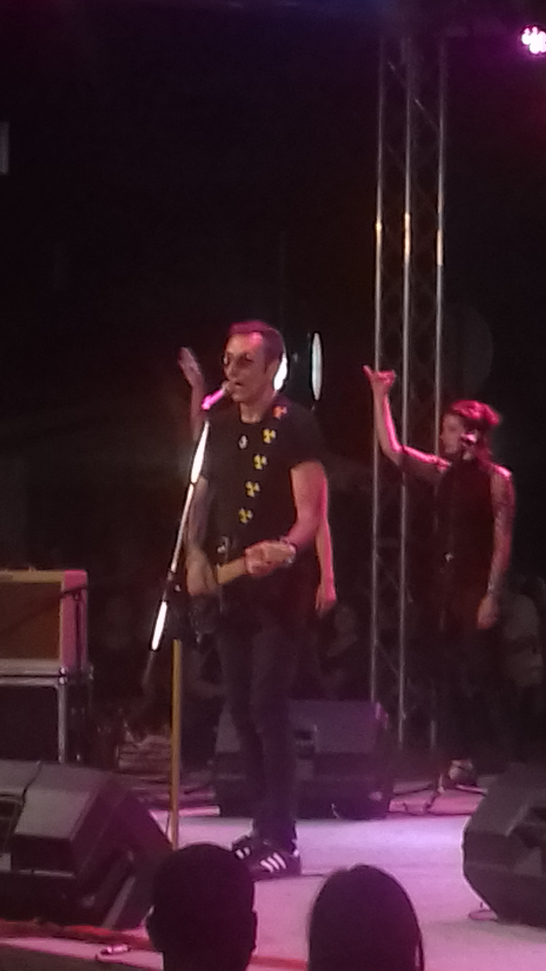 Наступ Бомбај штампе на Зеница самер фесту, други главни концерт фестивала